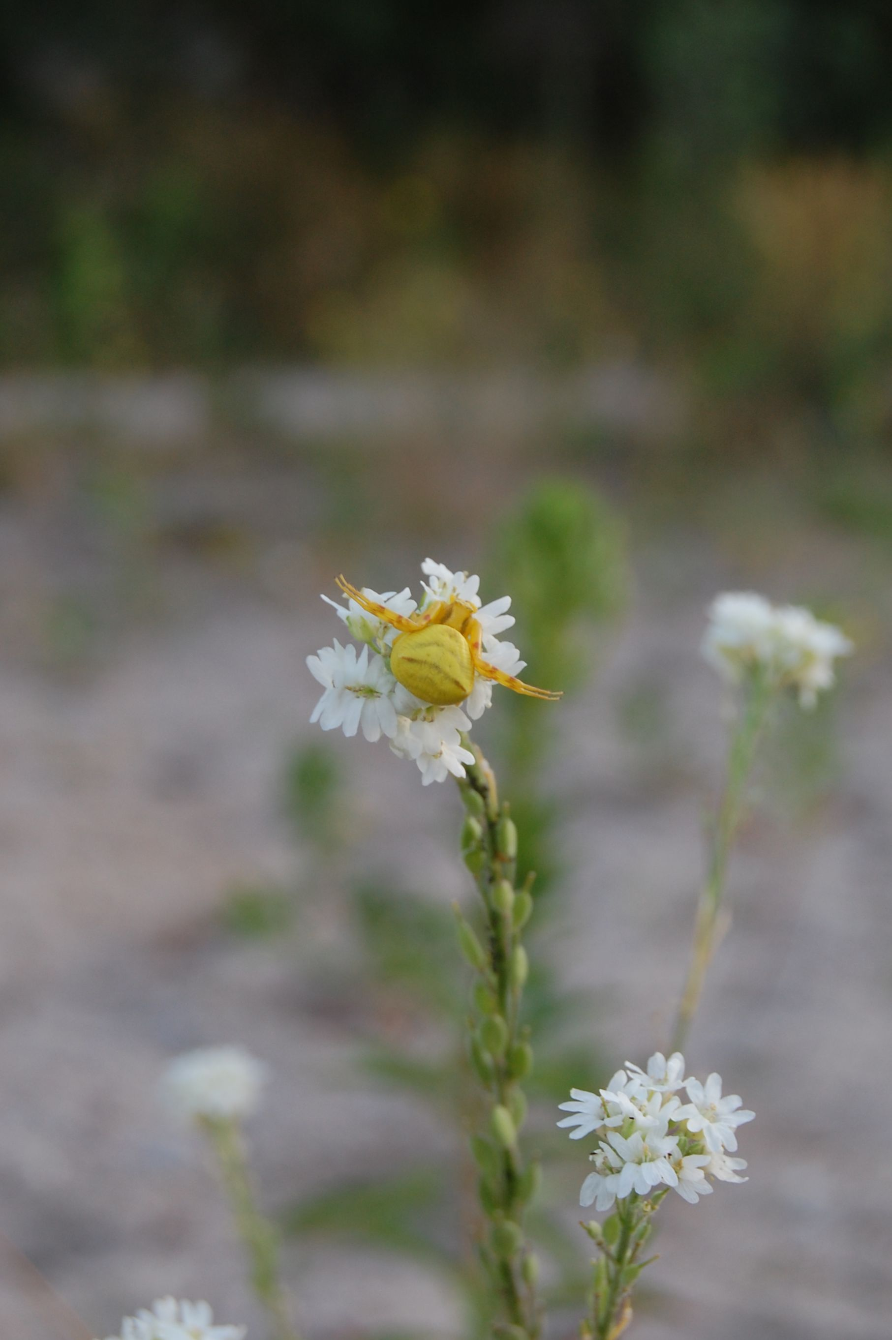 Thomisus onustus, Weibchen, gelb, in typischem Habitat auf Brache in Berlin-Mitte